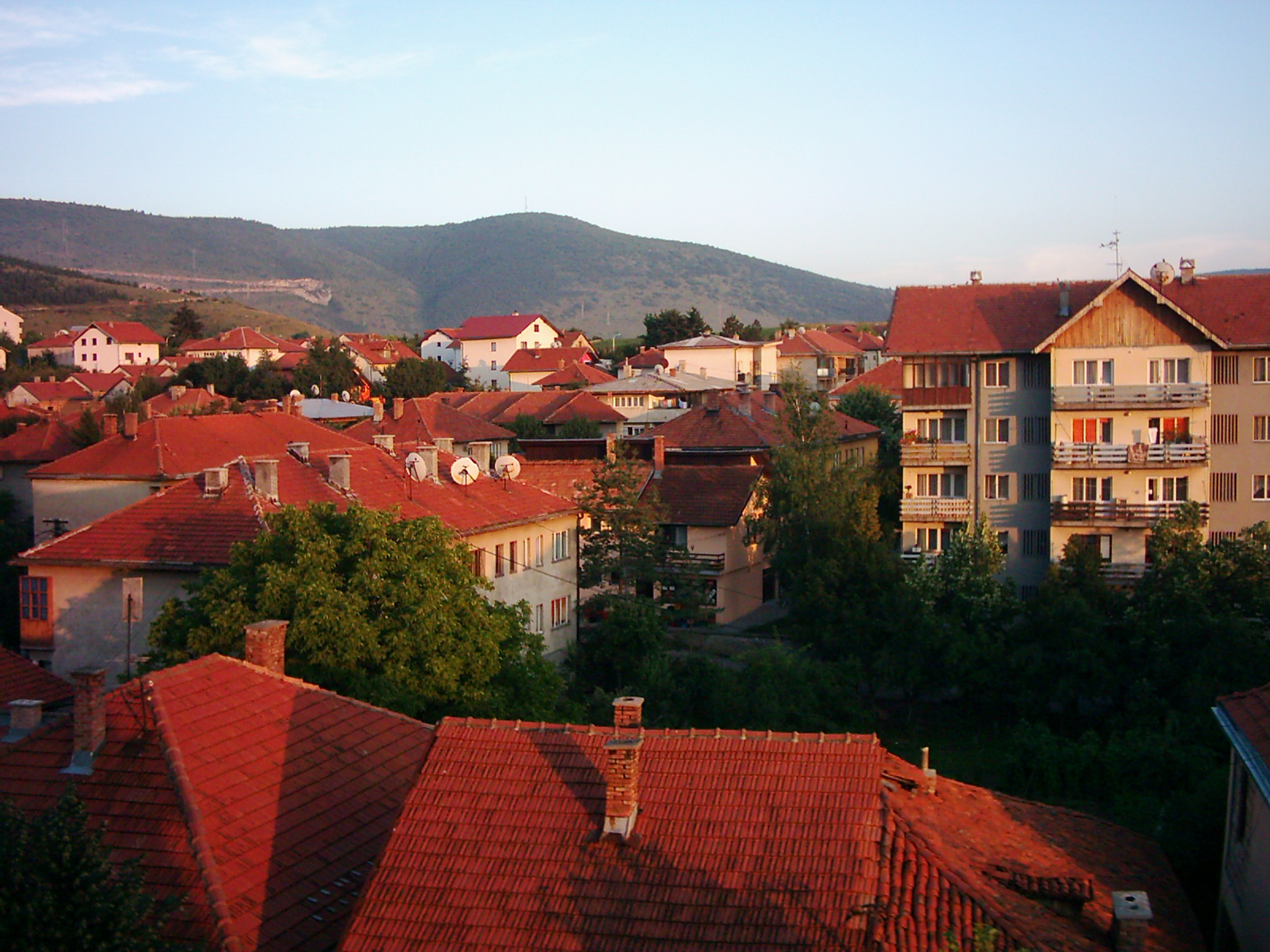 Панорама Пљеваља у љето 2005. године